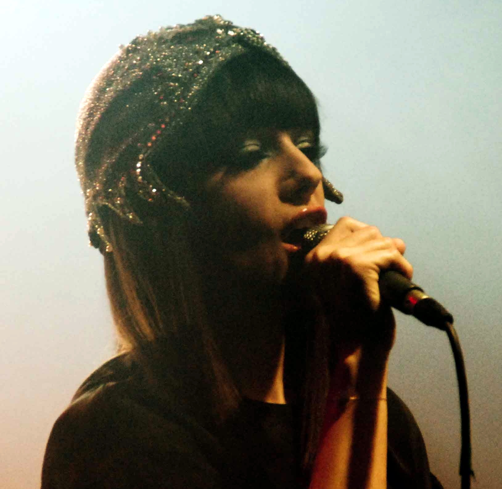 Alizée